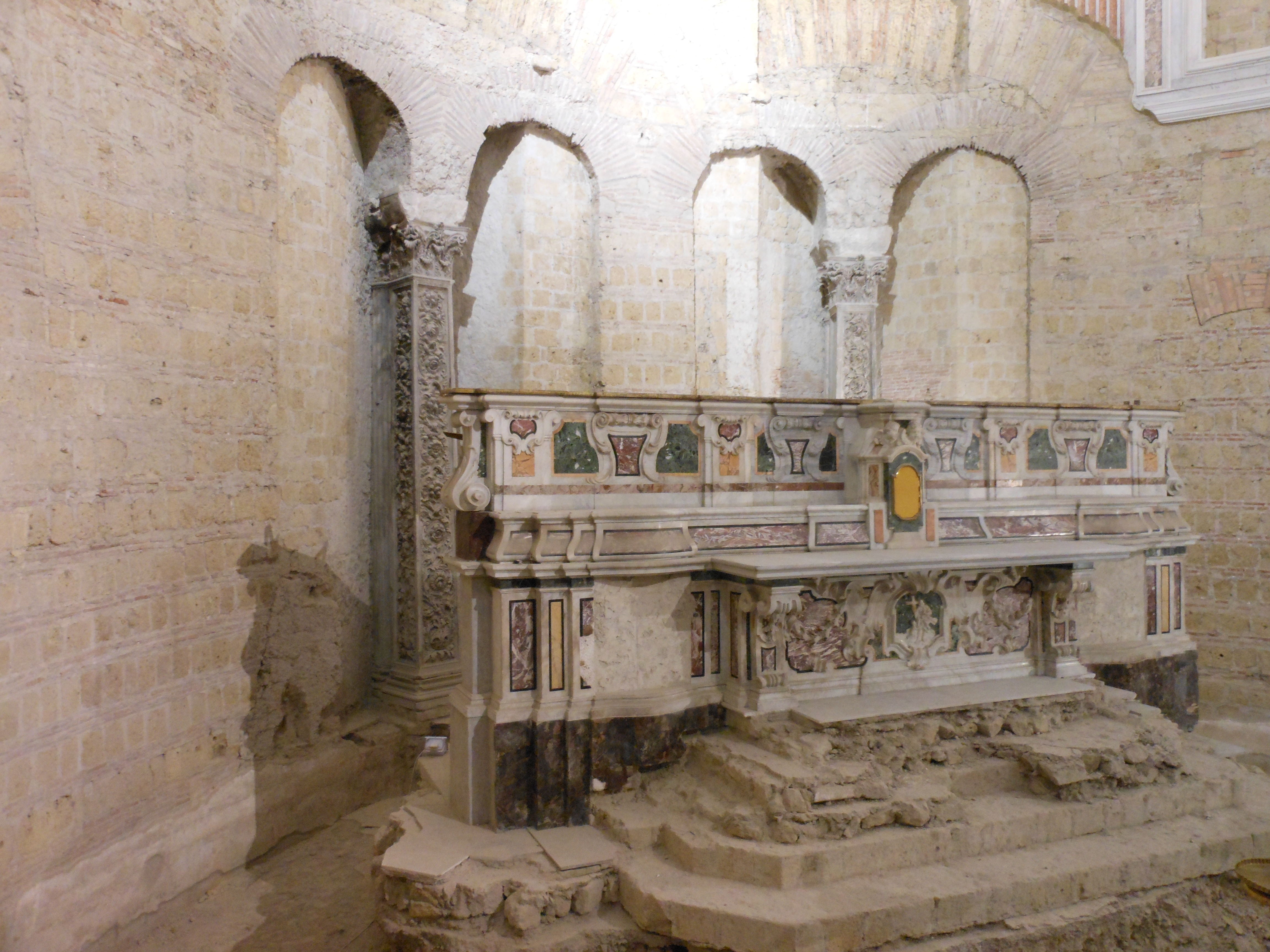 ALtare maggiore e abside paleocristiana della chiesa di San Giovanni Maggiore a Napoli